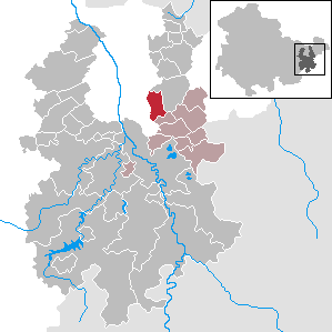 Kauern in Thuringia - District Greiz